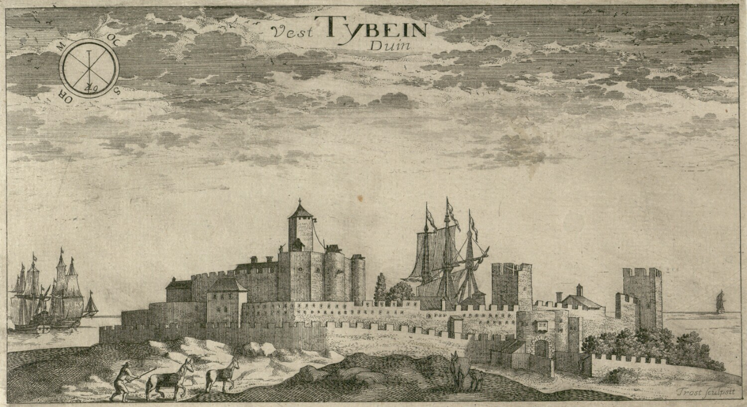 Duin